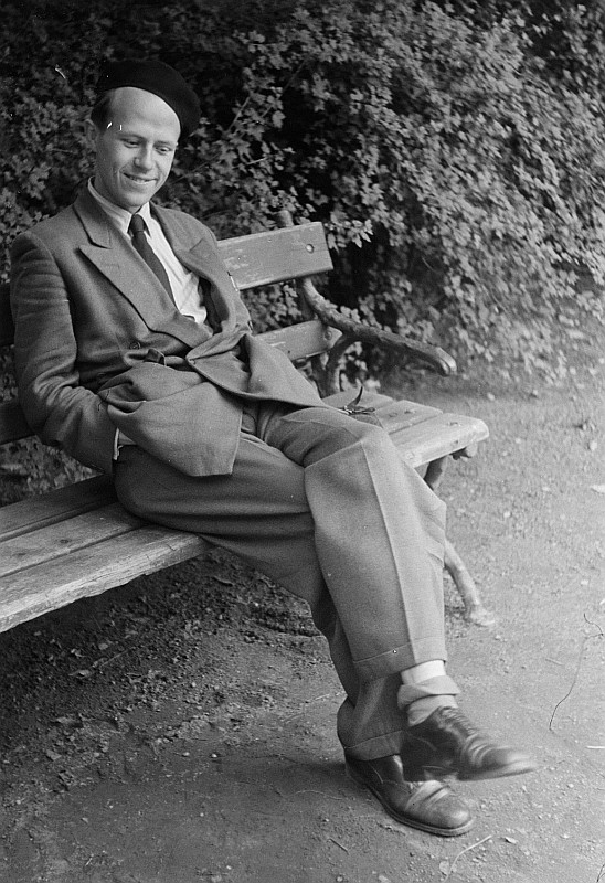 Original image description from the Deutsche Fotothek Porträt Roger Rössing